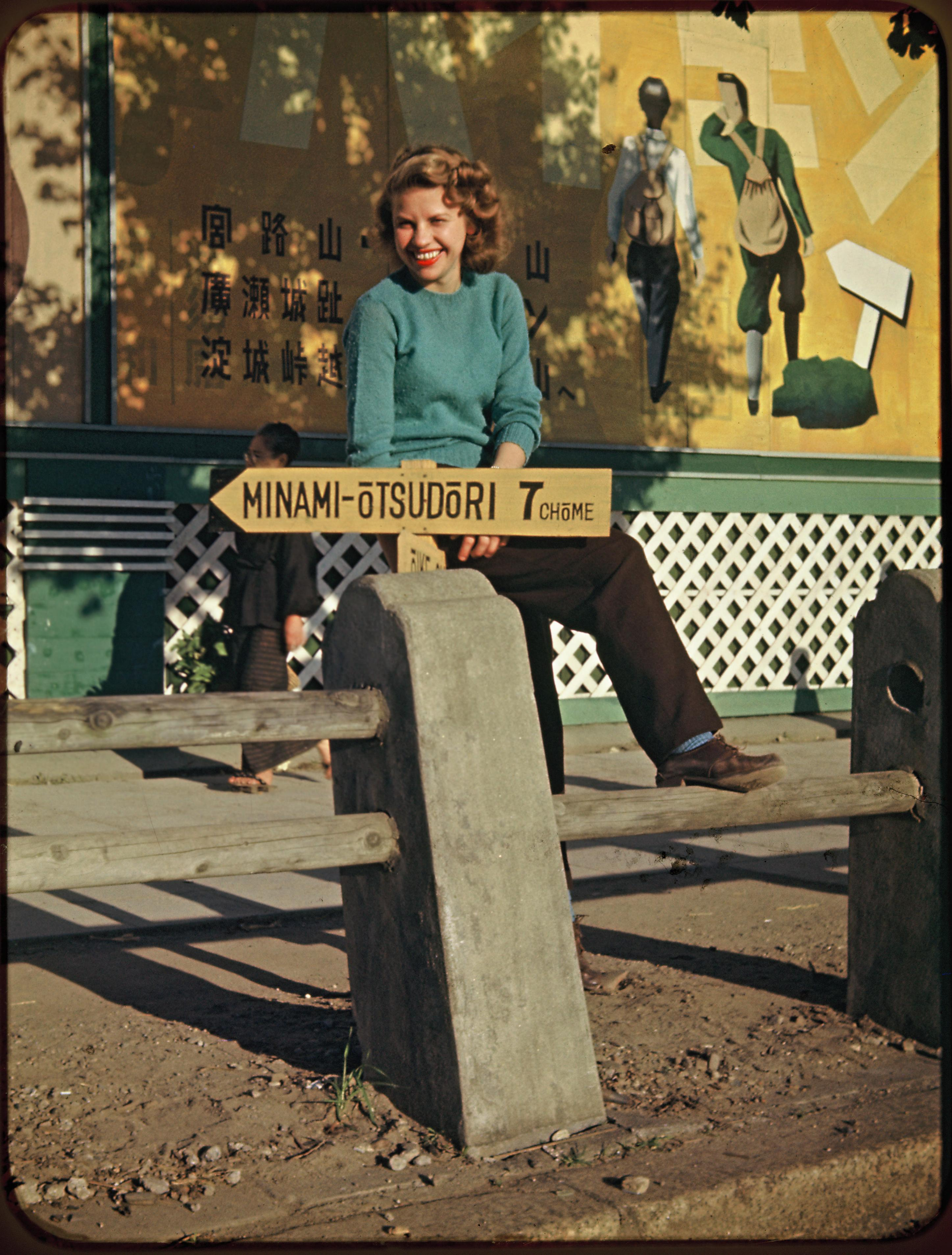 国立国会図書館デジタルコレクション - モージャー氏撮影写真資料 93 「女性（アメリカ人か）と『MINAMIOTSUDORI ７ CHOME』（南大津通７丁目）の標識（愛知県名古屋市）